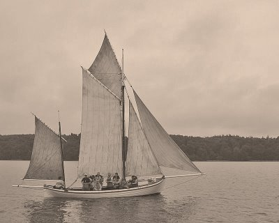 Åledrivkvasen Viktoria af Askø